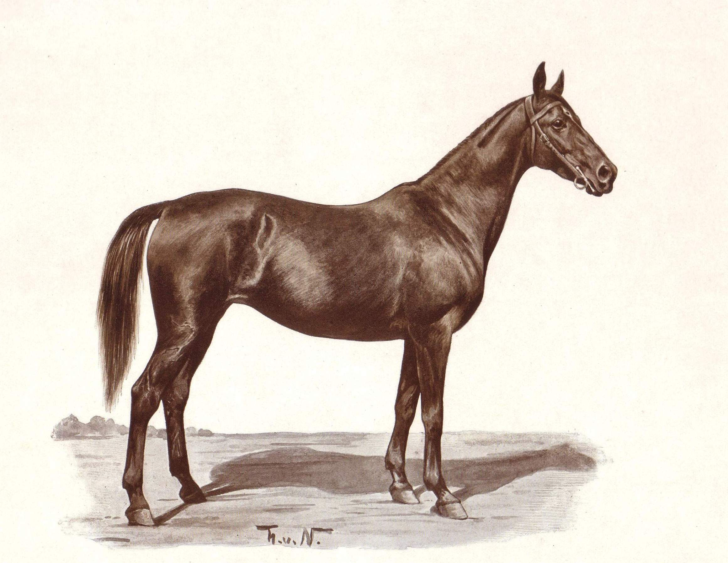 Anglo-Araber. Stute. "Belle de Jour", geb. 1892 in Frankreich